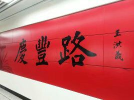 长春地铁庆丰路站大字壁